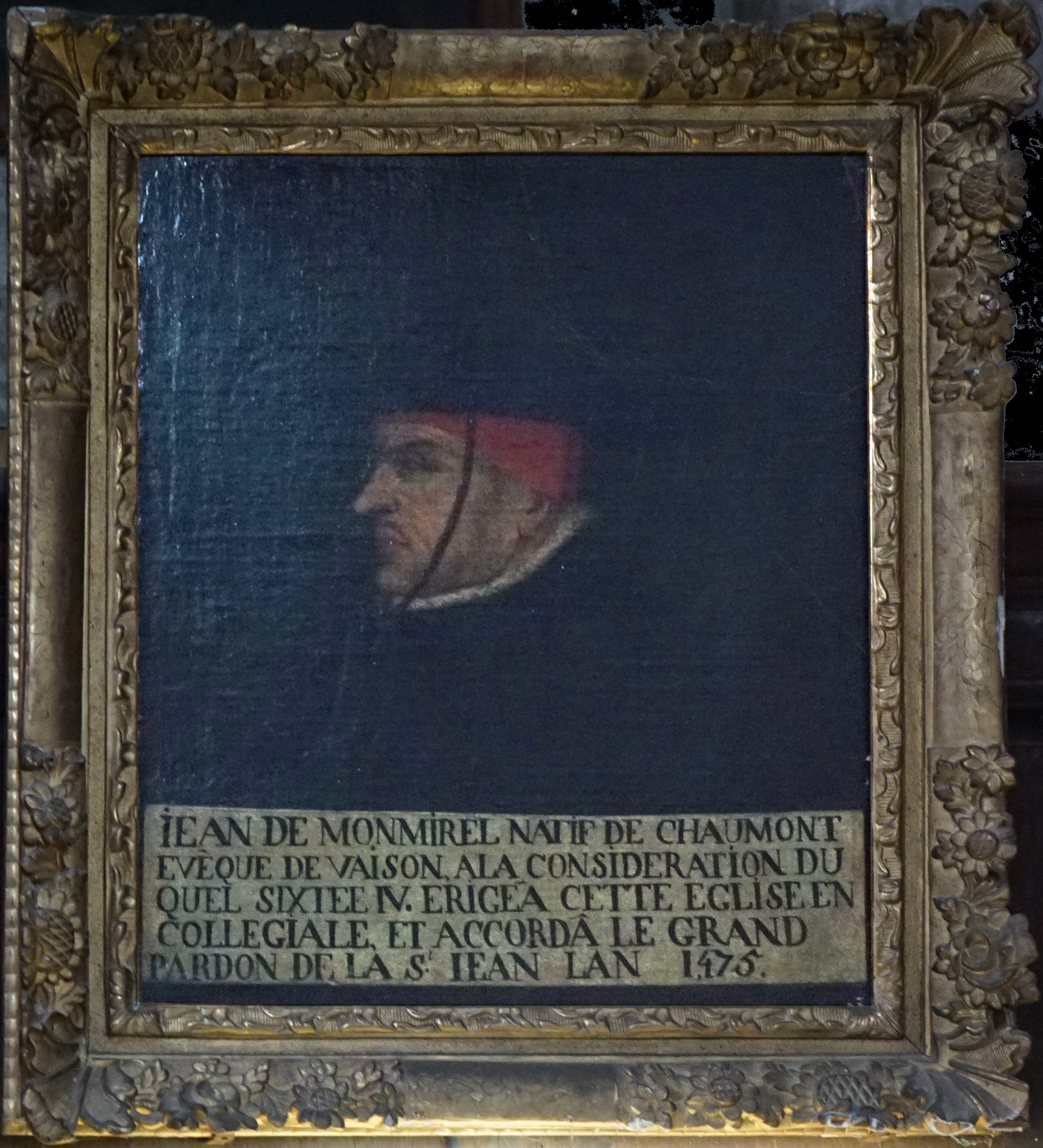 en la cathédrale de Chaumont.